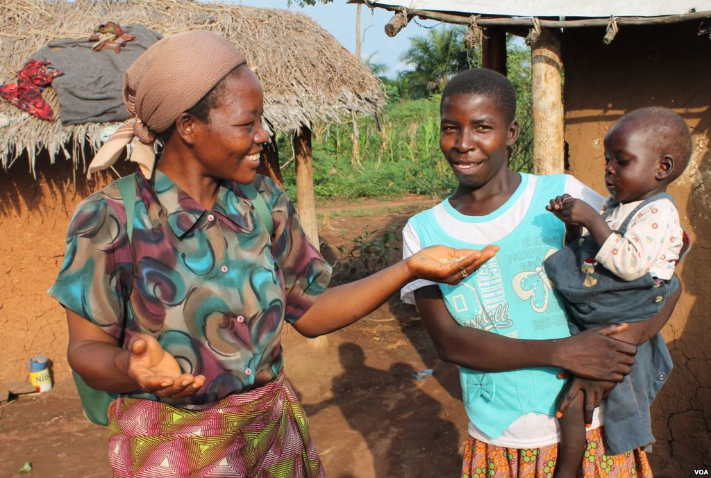 Sœur Angelique Namaika avec des déplacés à Dungu